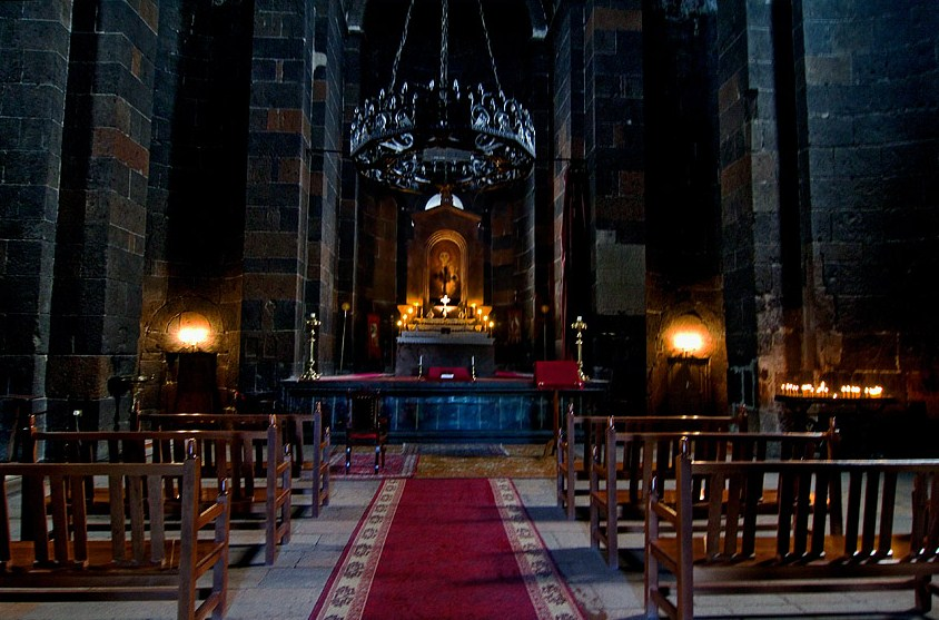 Церковь Св. Рипсиме, Армения. Внутри Храма.